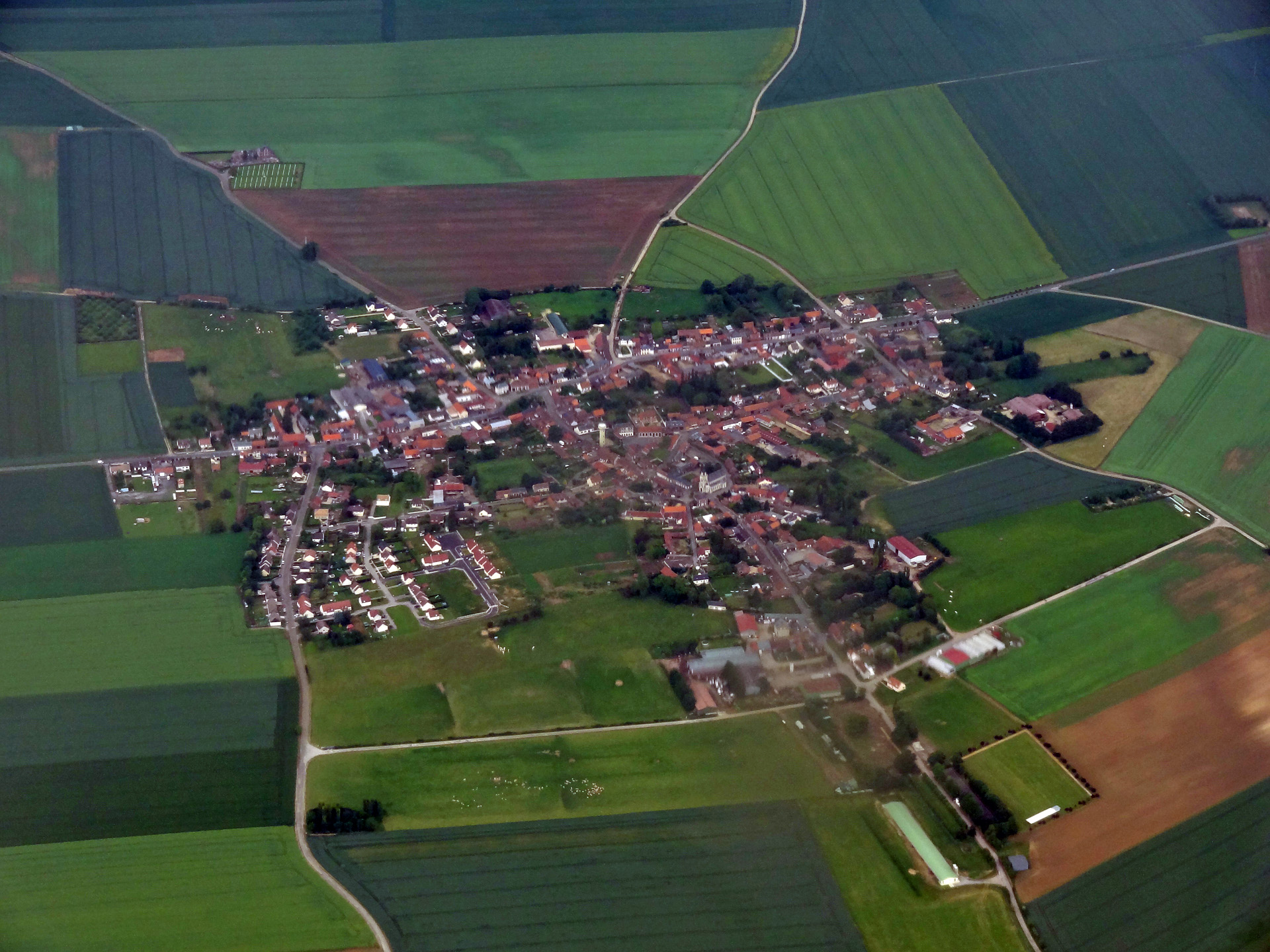 Vue aérienne de Méry-la-Bataille (Oise), France.